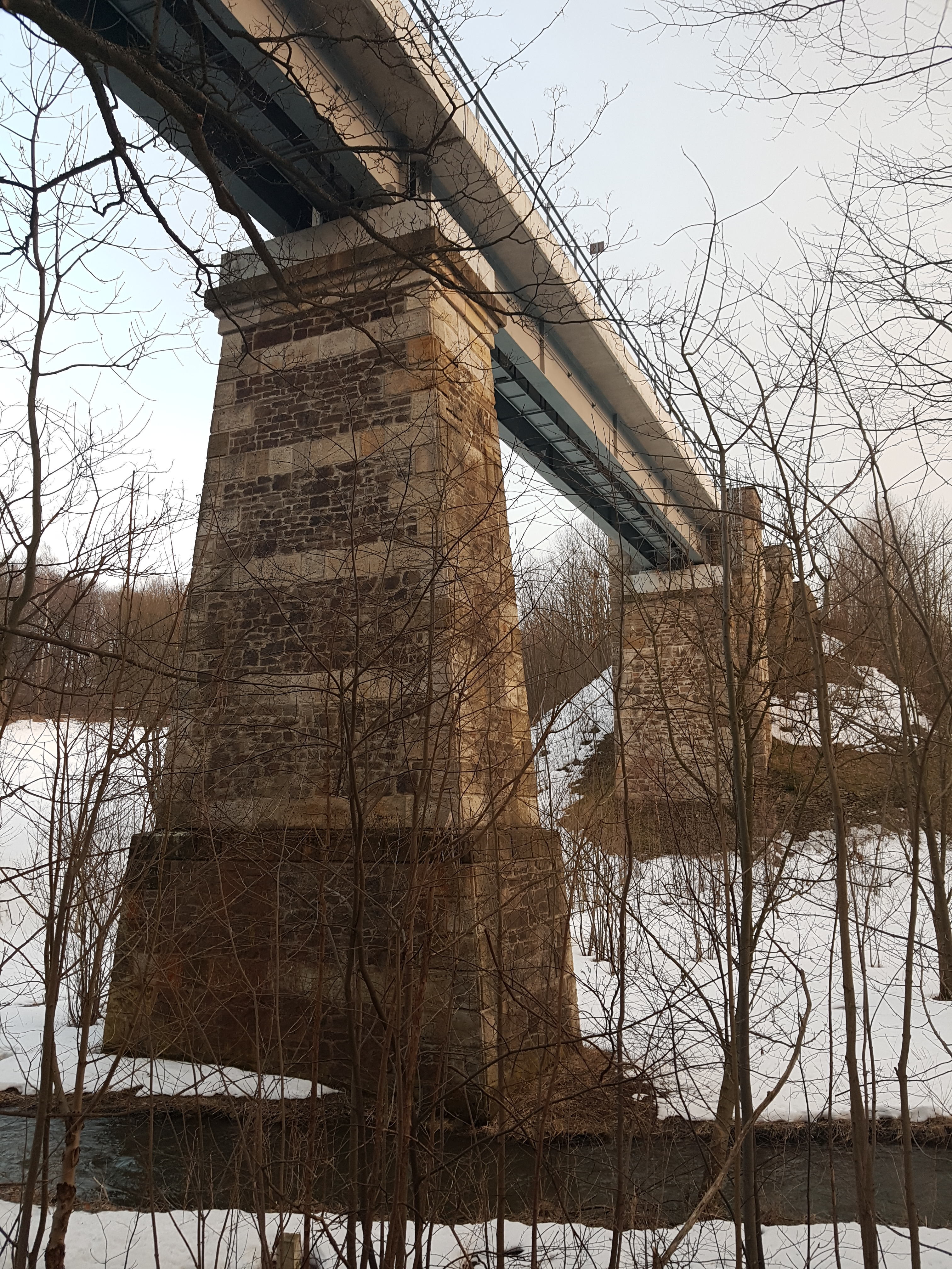 Viadukt der Bahnstrecke Vejprty - Bärenstein - Cranzahl über den Grenzfluss Pöhlbach (Polava)